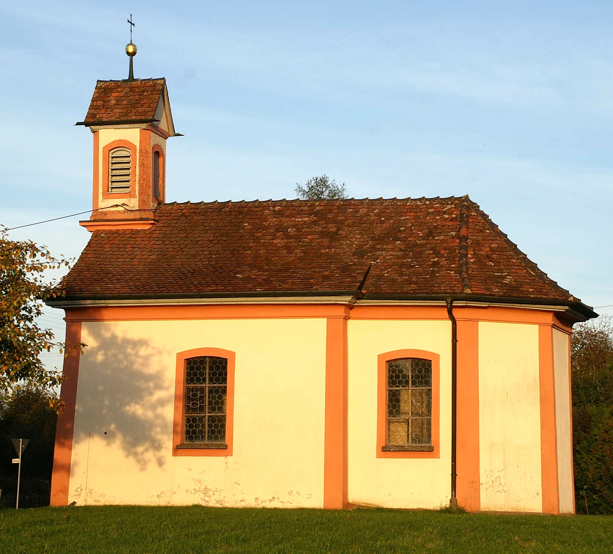 Eulogius-Kapelle in D-78355 Hohenfels / Kalkofen von Westen fotografiert